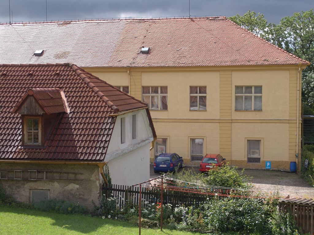 Třebušín - Ein Teil des Schlosses, in dem sich heute das Schloßhotel Hubertus befindet. (Foto von 2005)